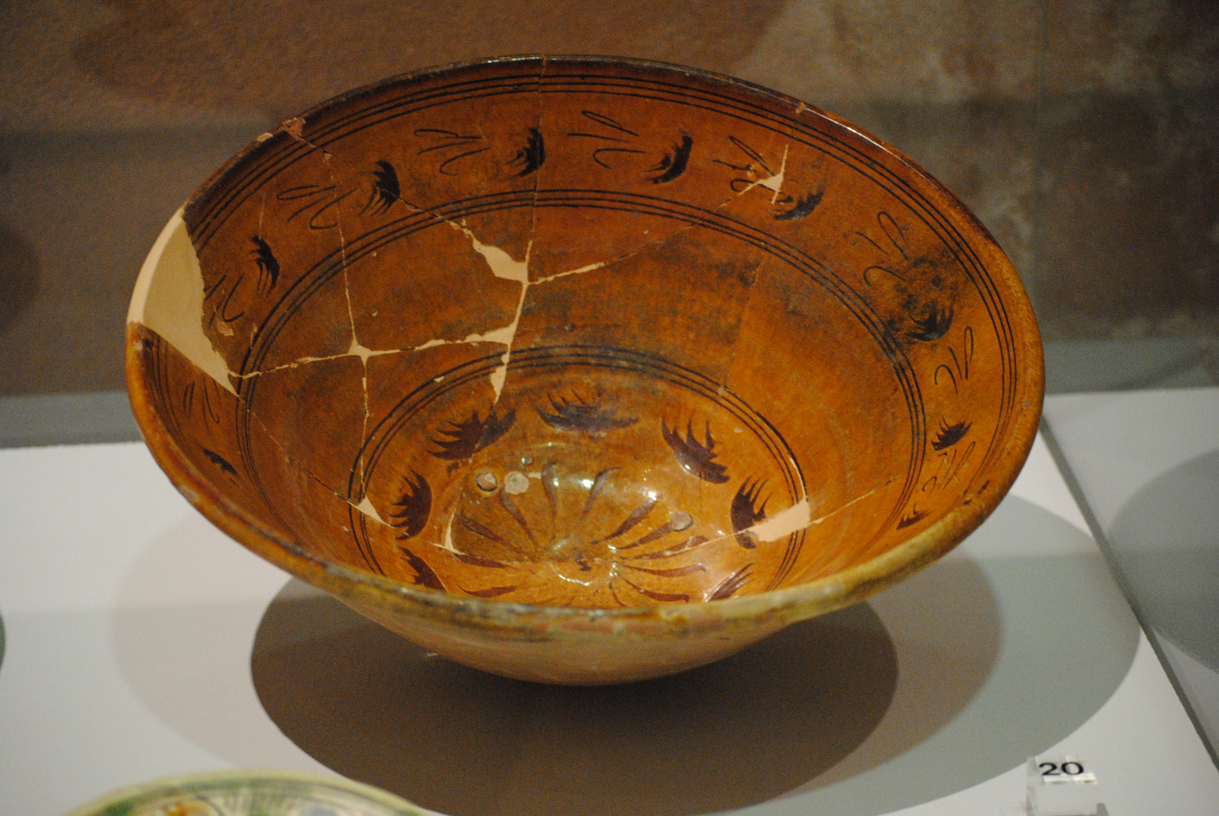 Catino ingobbiato e graffito a stecca, risalente al XVI secolo (recuperato durante gli scavi di piazza Dante, Pisa) - Museo nazionale di San Matteo.